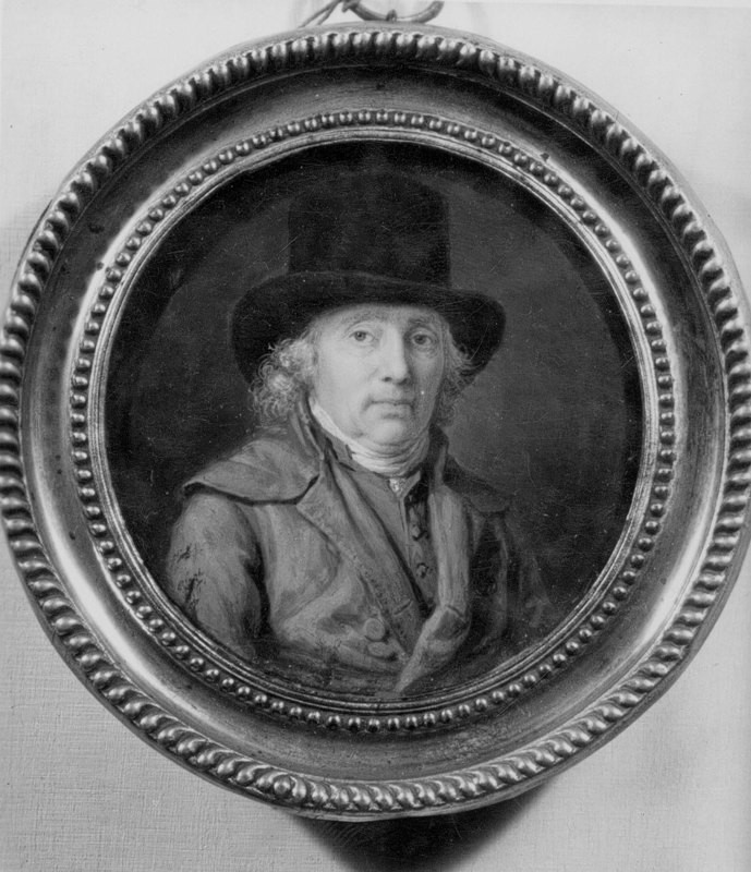 Miniature de Remacle Lissoir (1730-1806), dernier abbé de l'Abbaye de Laval Dieu.